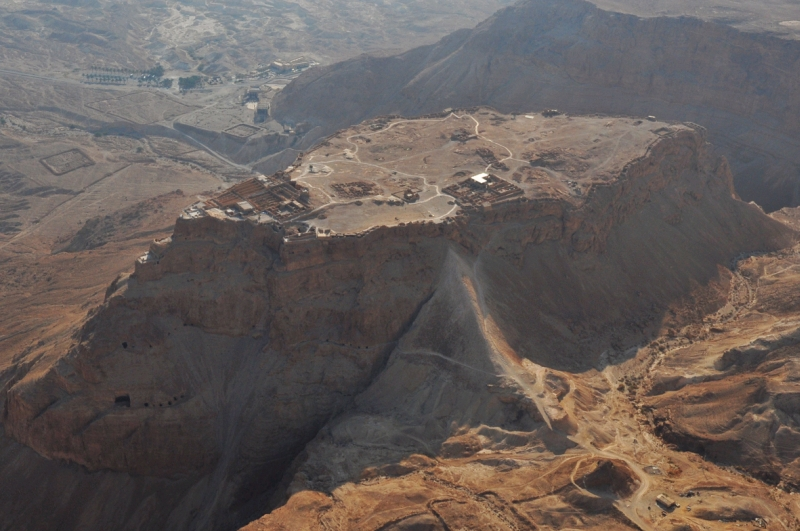 Masada